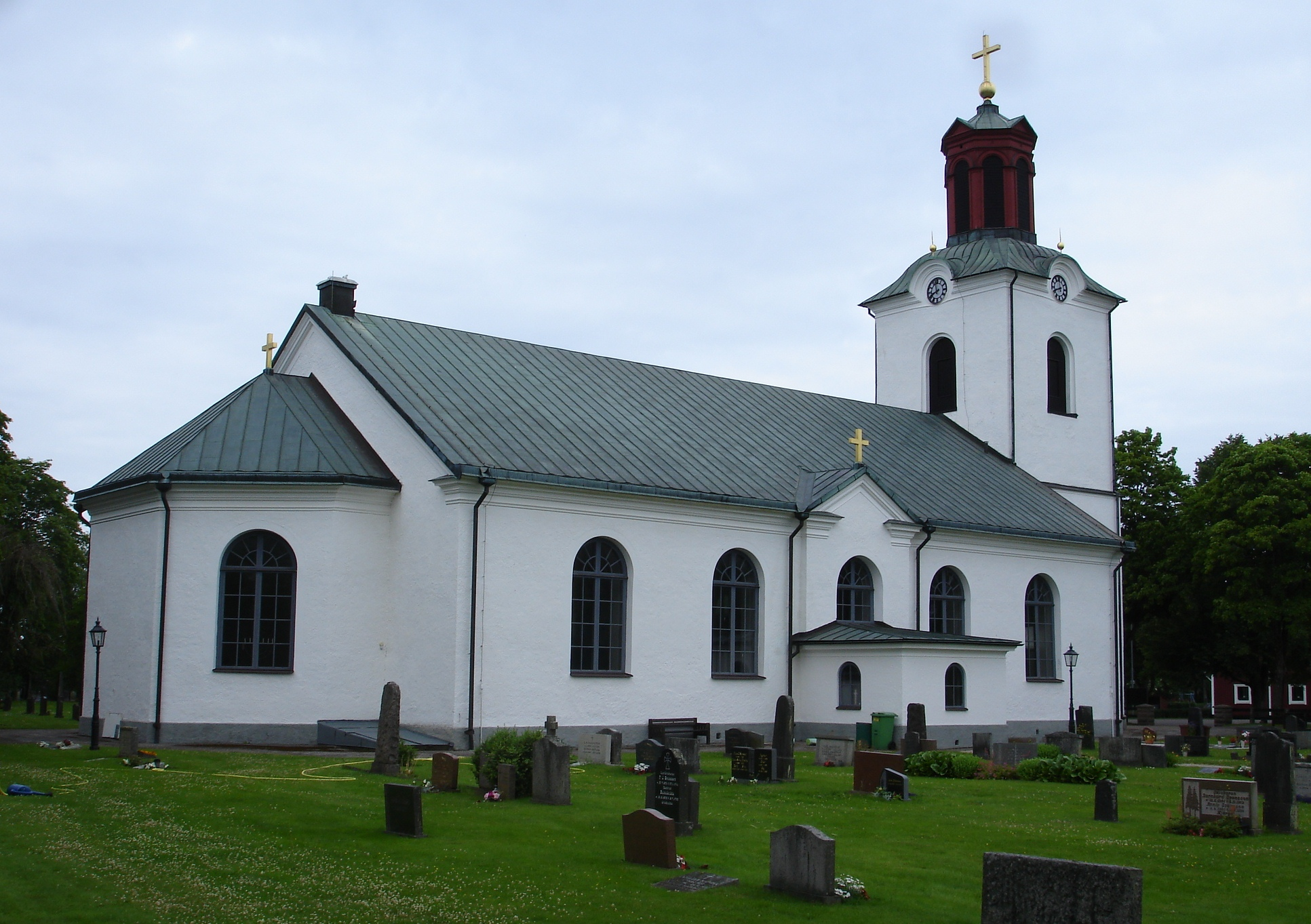 Traryds kyrka, sydvästra Kronobergs län i Markaryds kommun